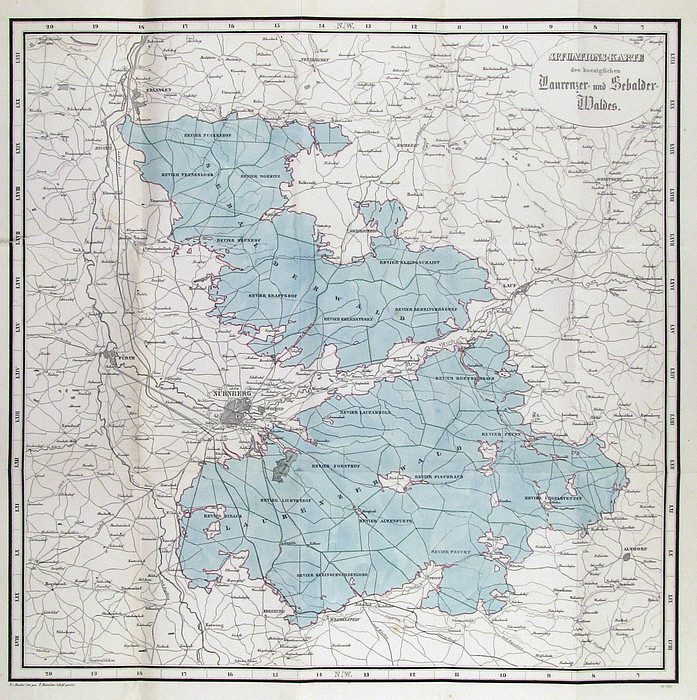 Karte aus: Beschreibung des Reichswaldes bei Nürnberg in geschichtlicher und wirthschaftlicher Beziehung. München, Palm, 1853.